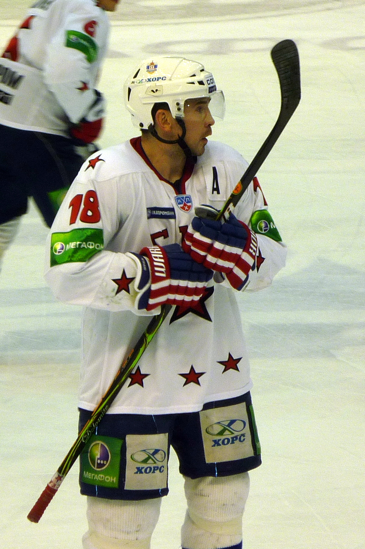 Нападающий питерского СКА Сергей Брылин в матче против нижегородского «Торпедо» 12 декабря 2010 года